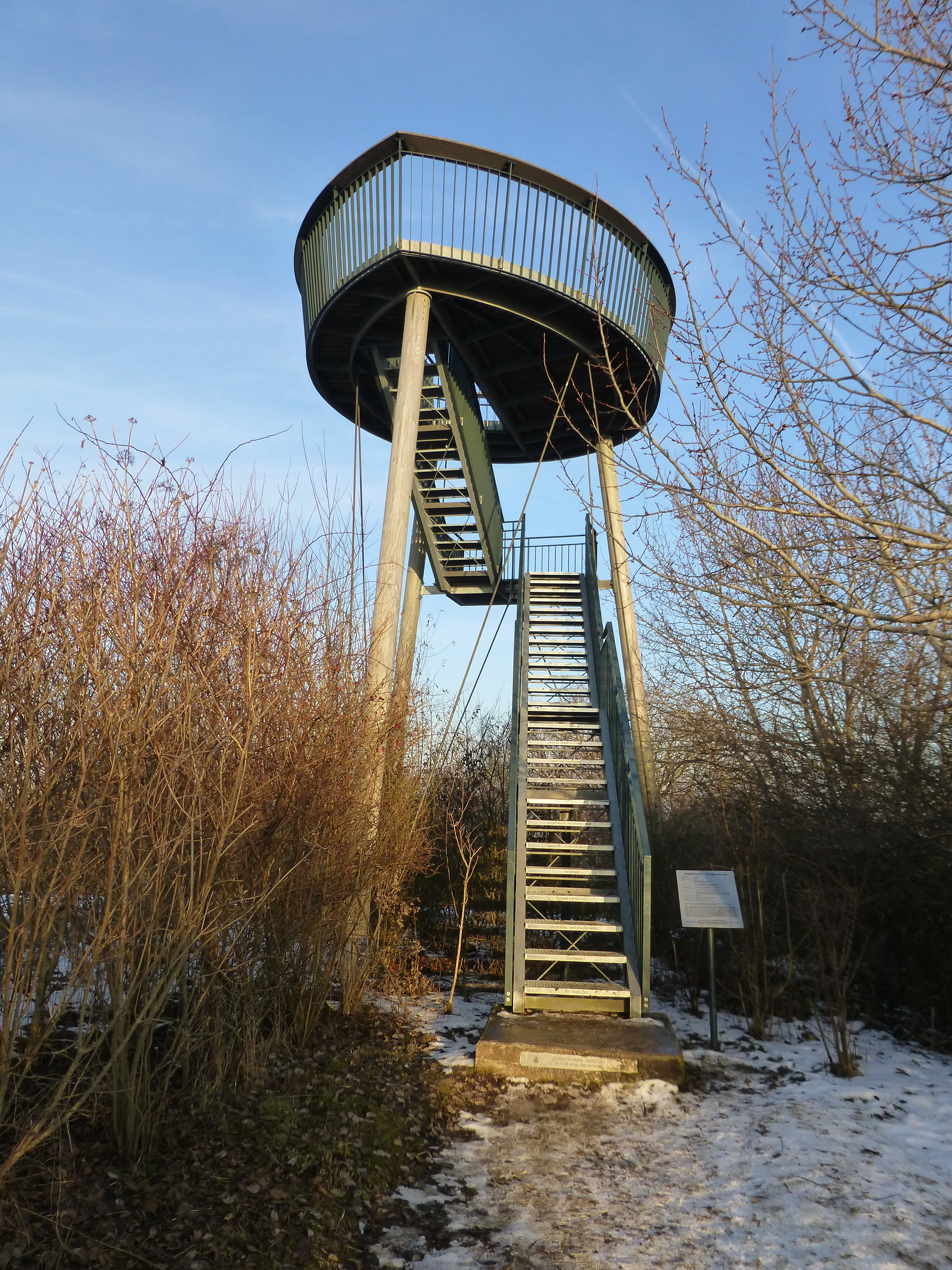 Aussichtsplattform „Blattform“, Zugangsseite mit Treppenaufgang